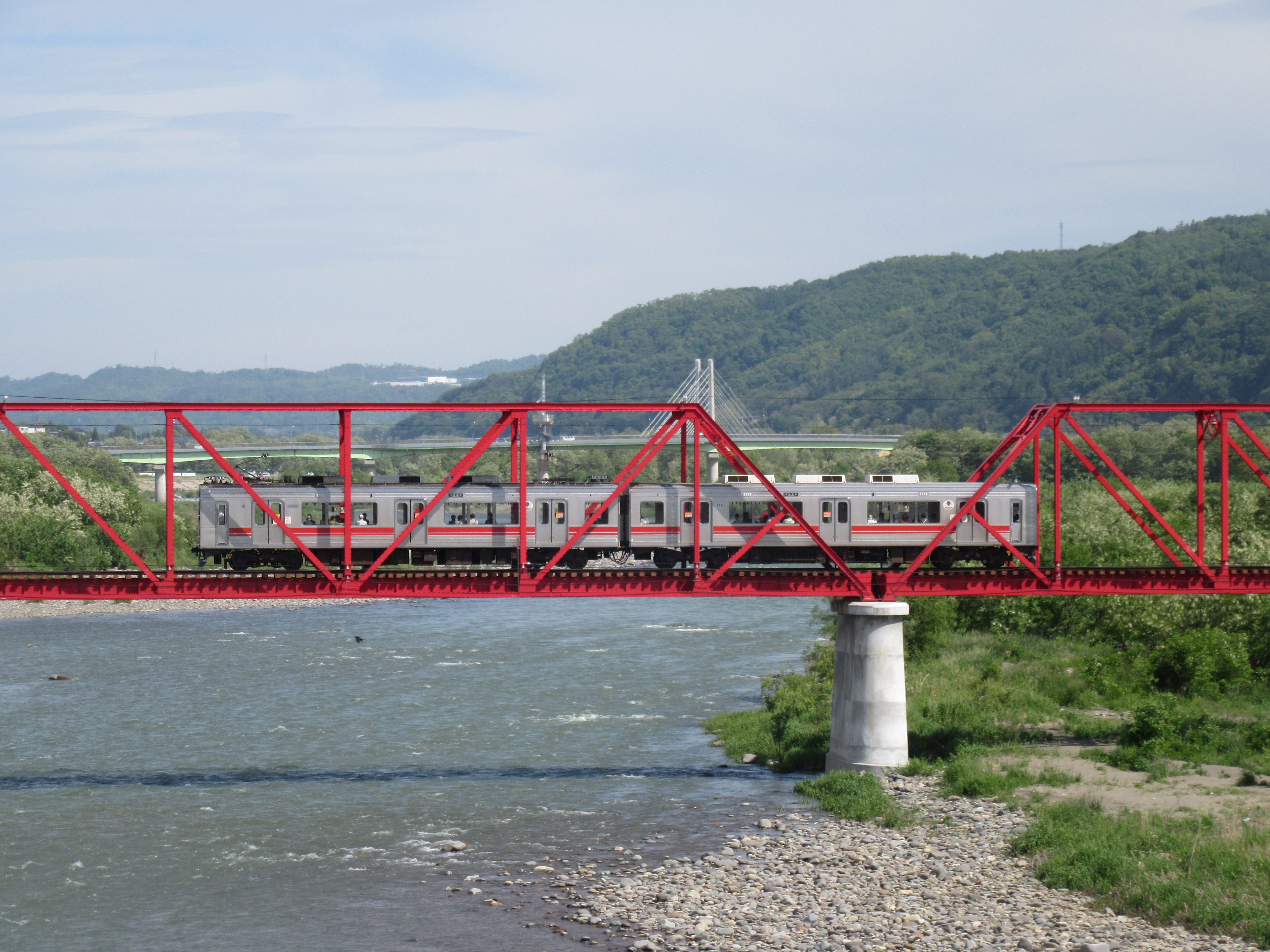 2018年5月12日 上田～城下間にてCanon PowerShot SX610 HS